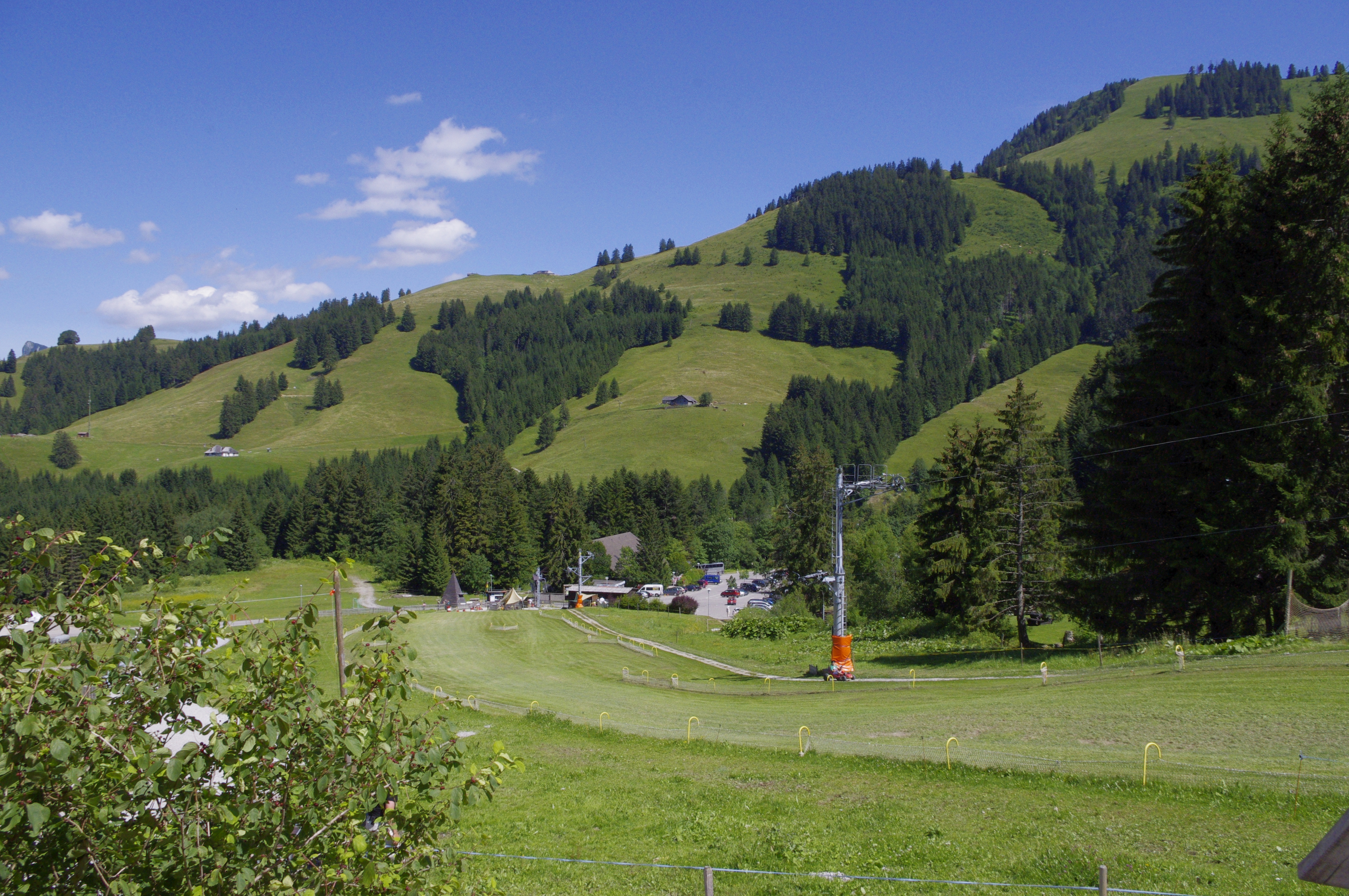 Moléson-village, Suisse. Vue sur la piste de "Dévalkart" et le parking depuis le village.